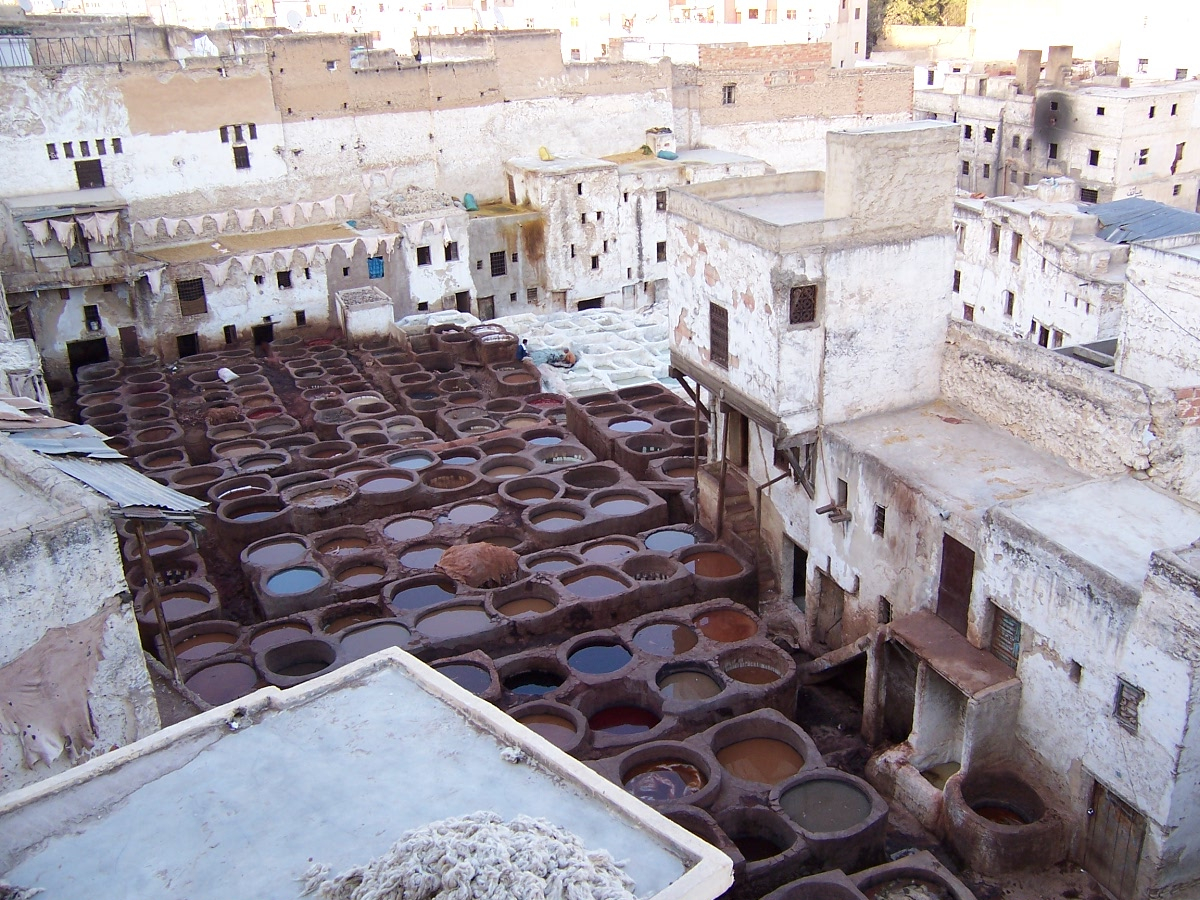 Fez, Morocco